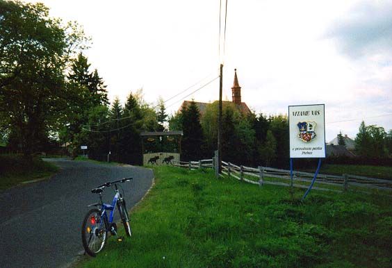 Abendstimmung am Ortseingang von Frühbuß mit Blick zur St. Batholomäuskirche